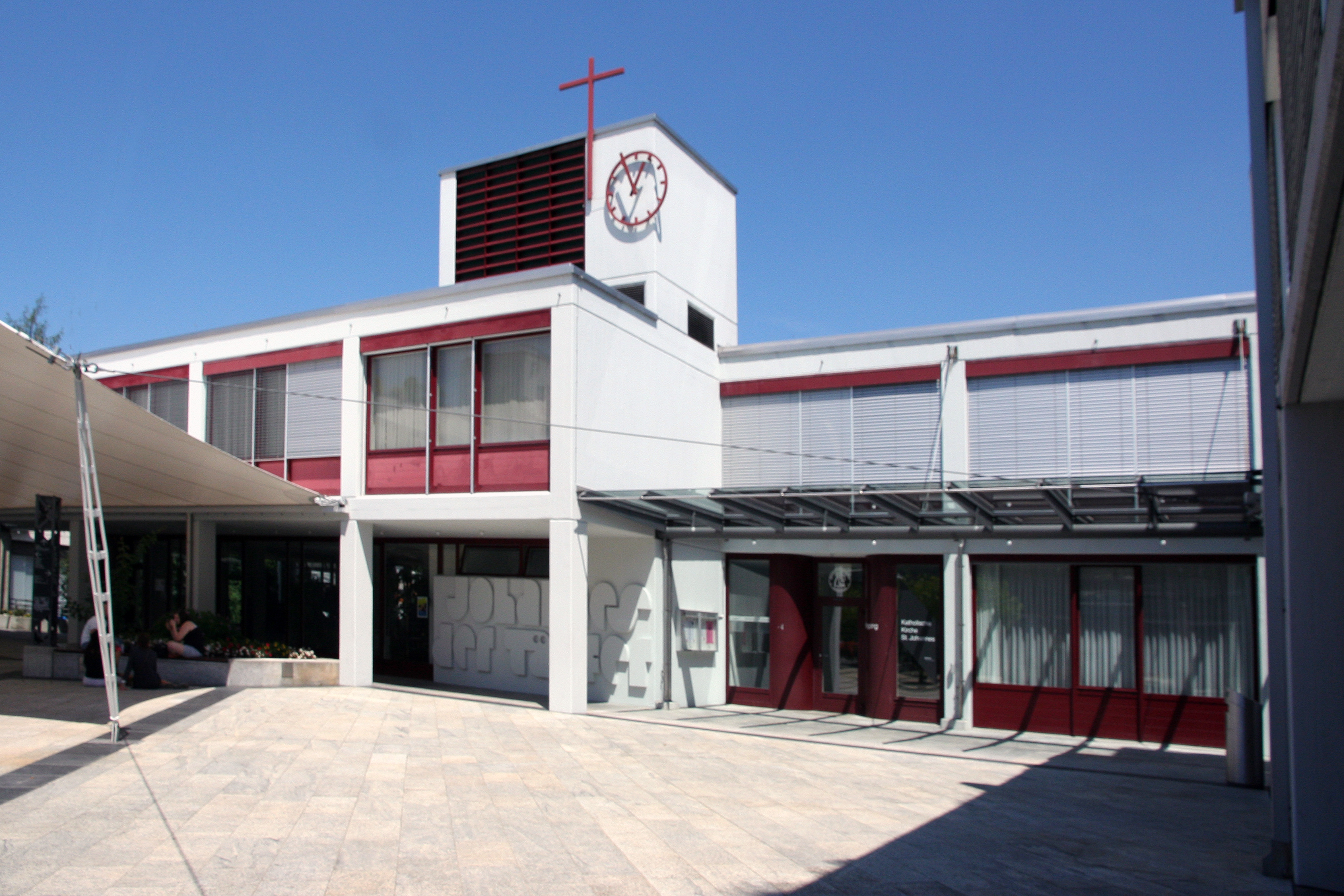 Römisch-katholische Pfarrkirche St. Johannes der Täufer Geroldswil, Aussenansicht